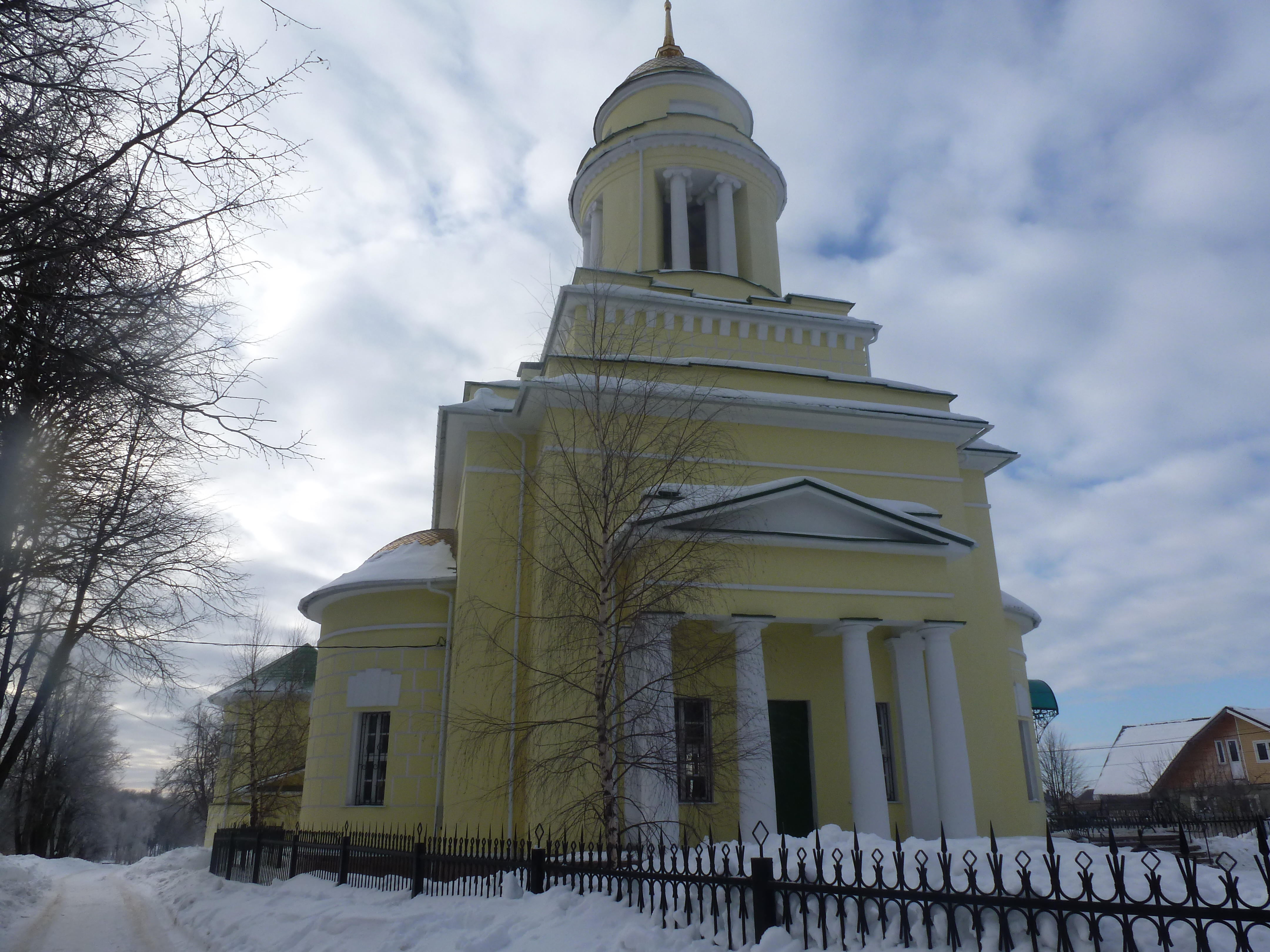 Preĝejo en Jerŝovo